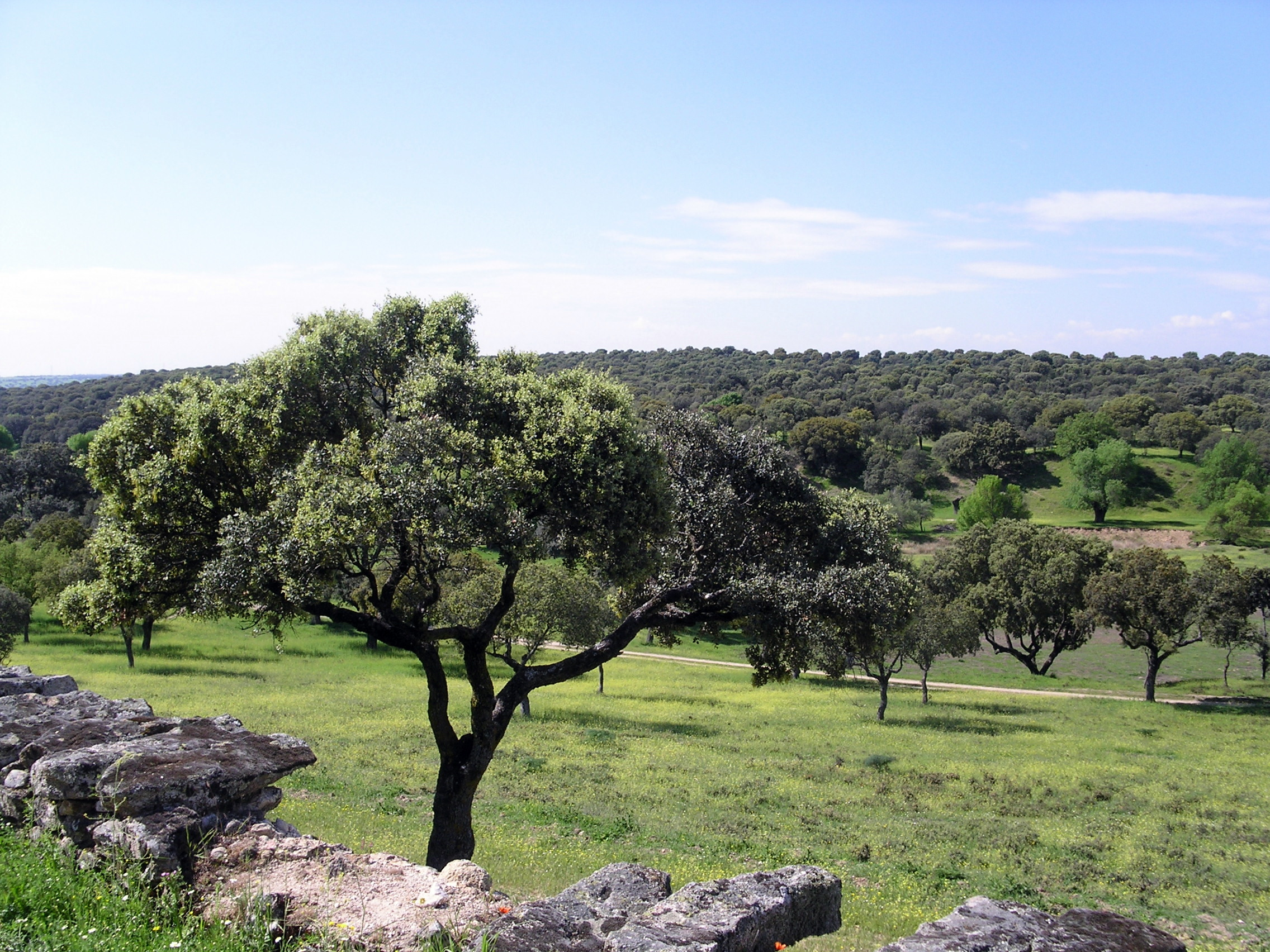 2010-05-01 Soto de Viñuelas